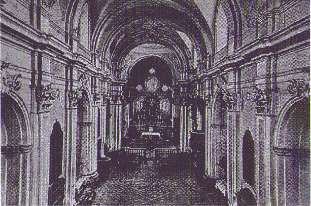 Interno dell'Abbazia Florense in stile Barocco - Anni '30